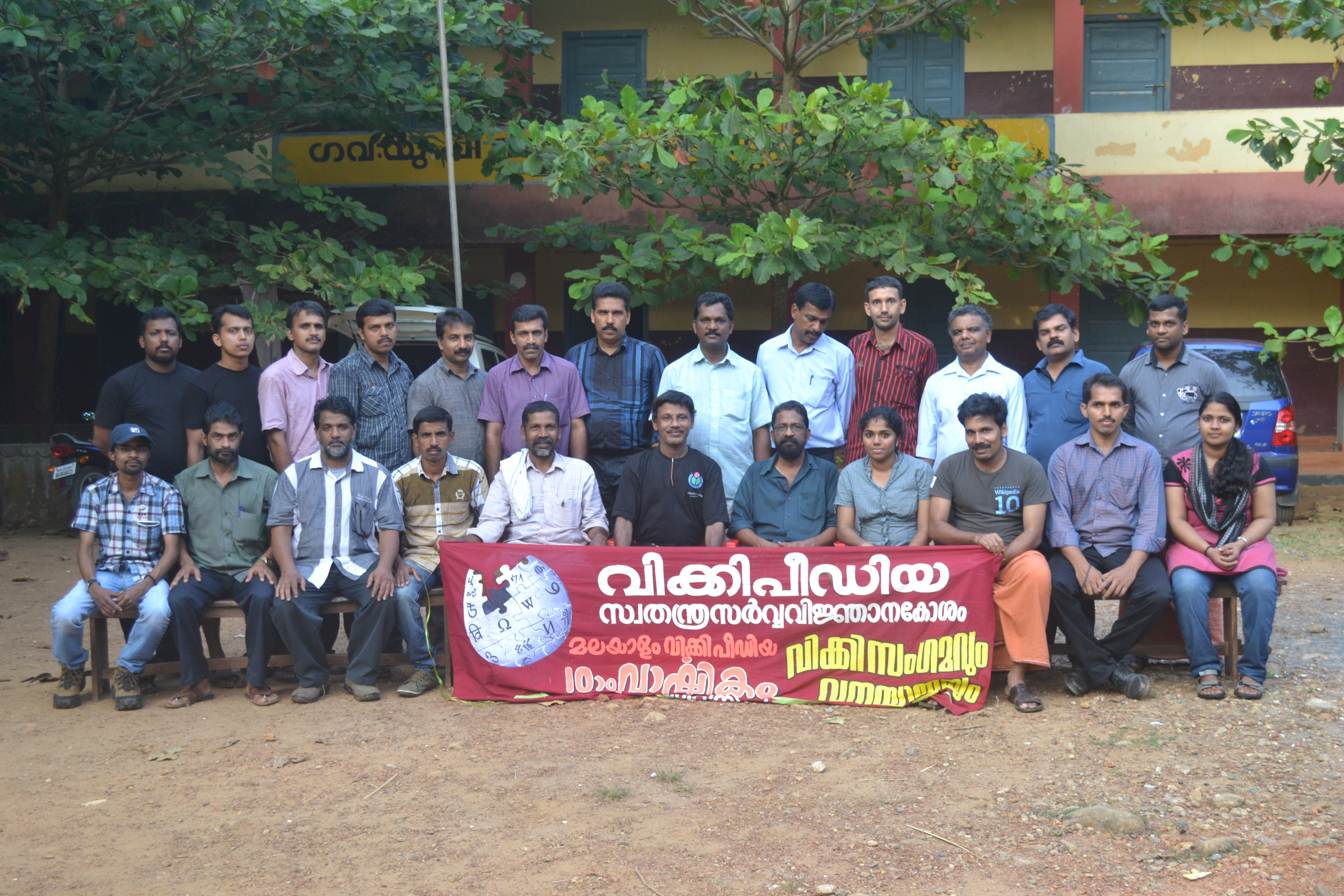 മലയാളം വിക്കിപീഡിയയുടെ പത്താം വാർഷികത്തോടനുബന്ധിച്ചു നടത്തിയ വിക്കിവനയാത്രയിൽ പങ്കെടുത്തവർ